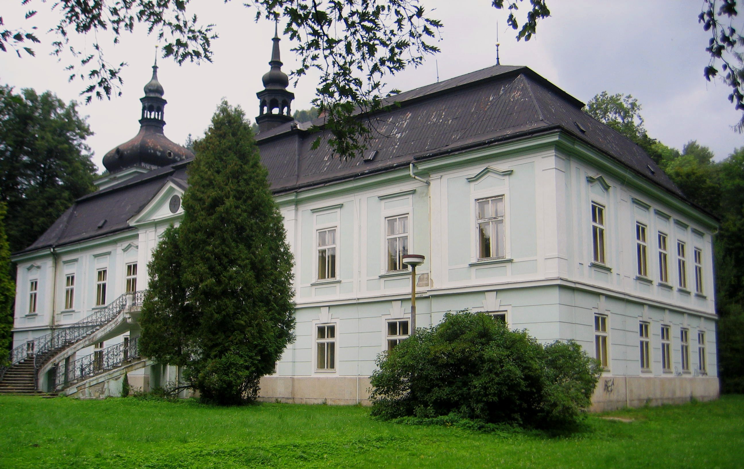 Zámek Horní Maršov, Czerninská 1, Horní Maršov